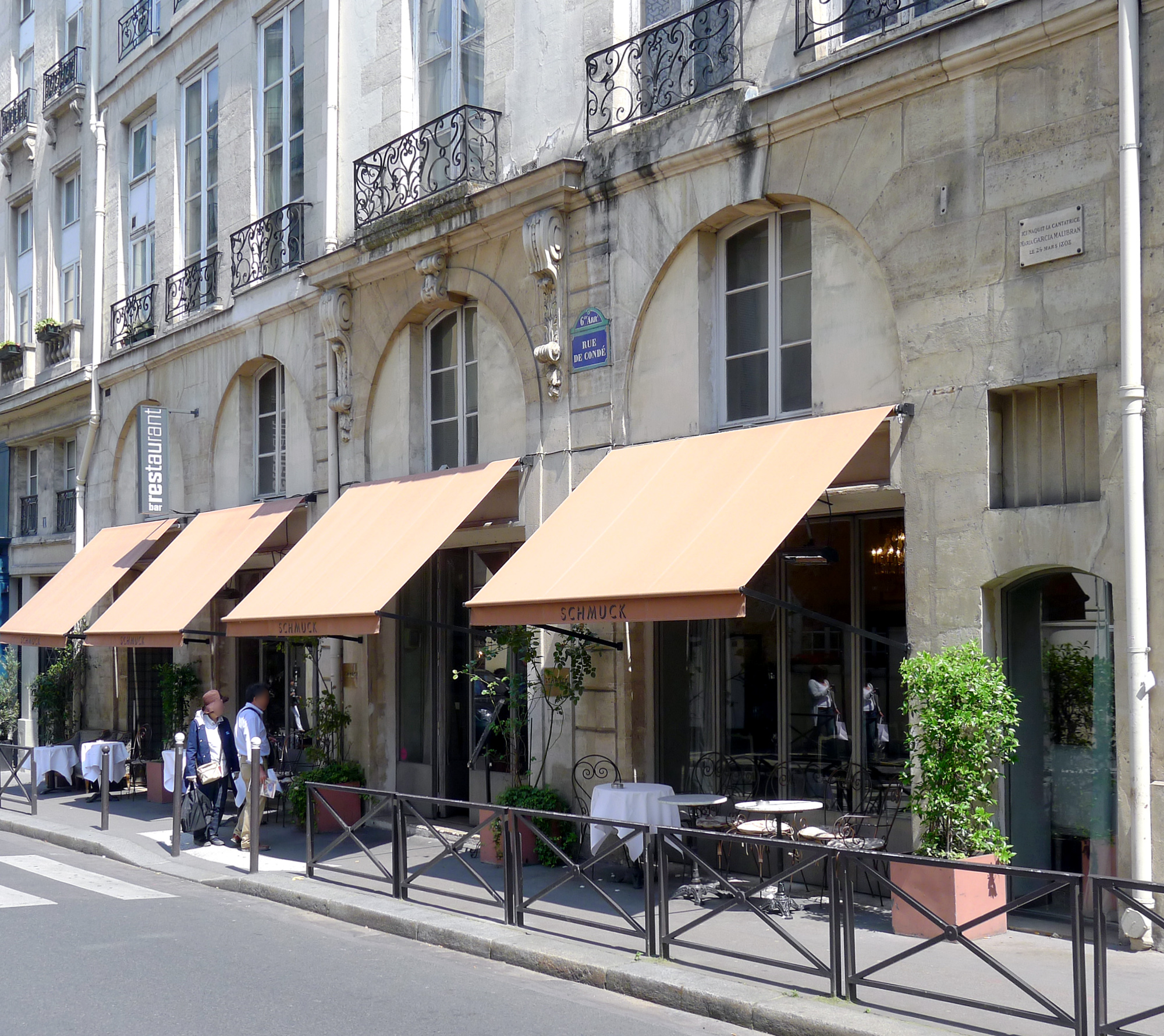 Rue de Condé (n° 1 et 3) - Paris VI Object location48° 51′ 05.65″ N, 2° 20′ 18.31″ E